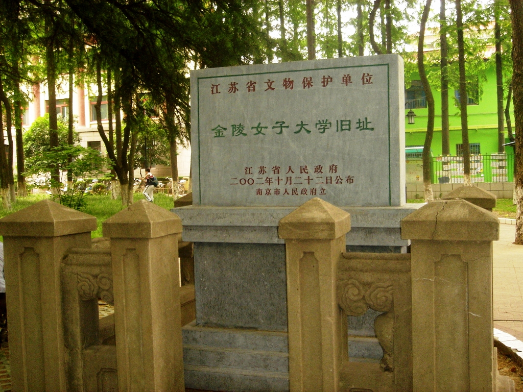 NanjingNormalUniversity monument,南京师范大学随园校区内的金陵女子大学纪念碑